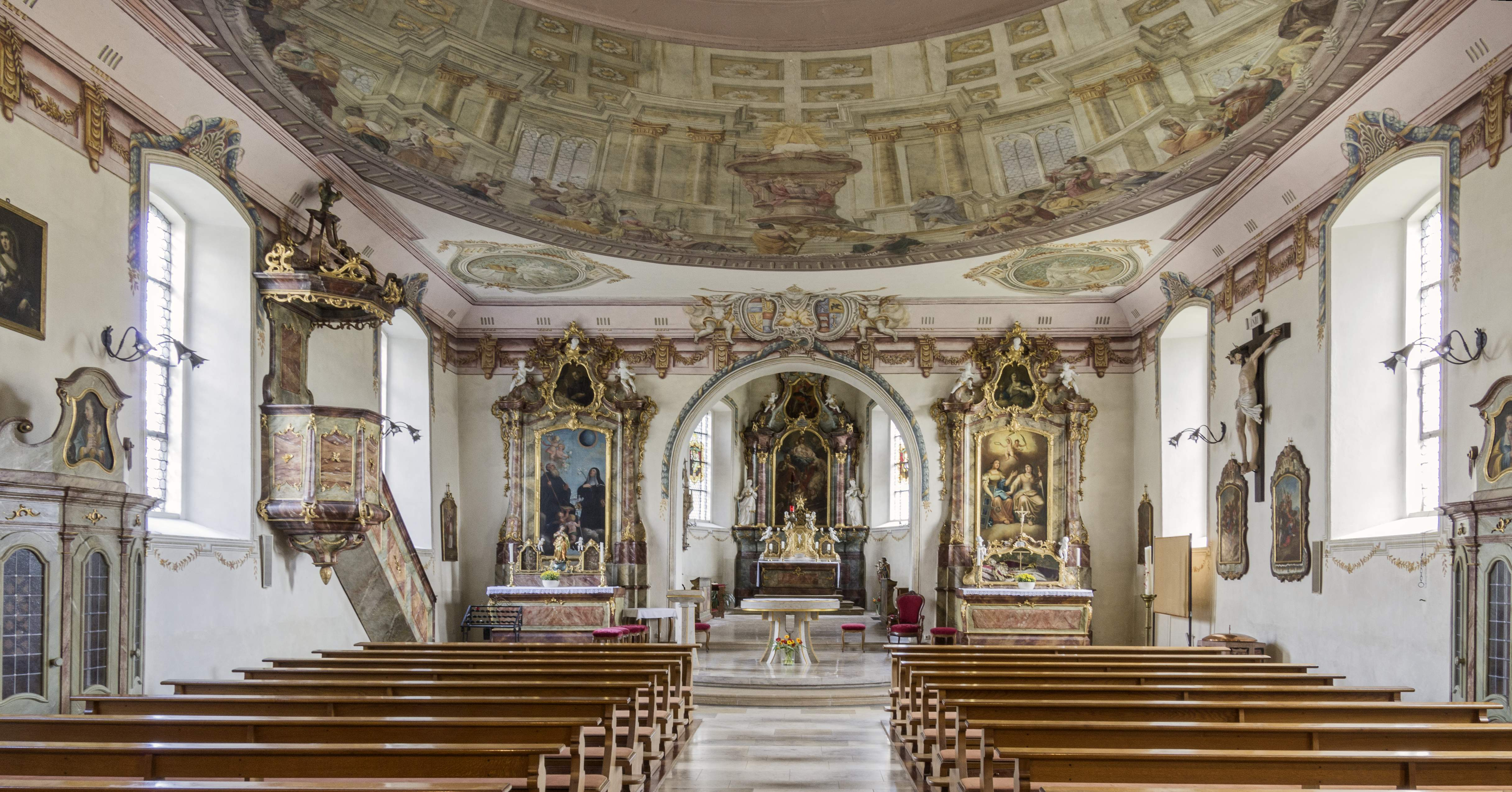 St. Fides und Markus in Sölden